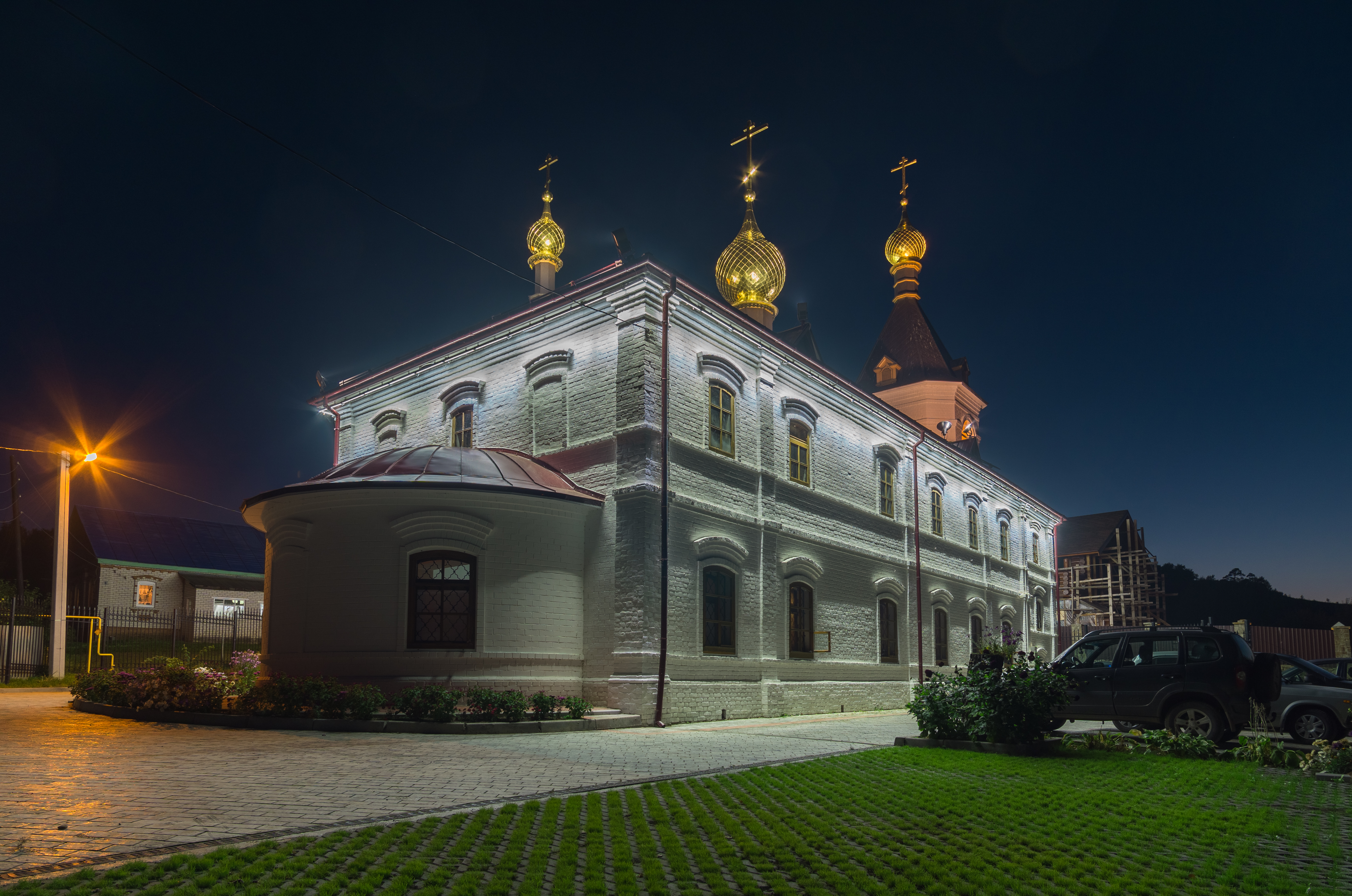 старообрядческая (австрийская) церковь: улица Клубная, 3, Безводное, Кстовский район, Нижегородская область